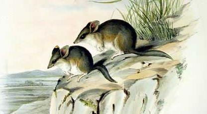 Sminthopsis crassicaudata (orig. Podabrus crassicaudatus)